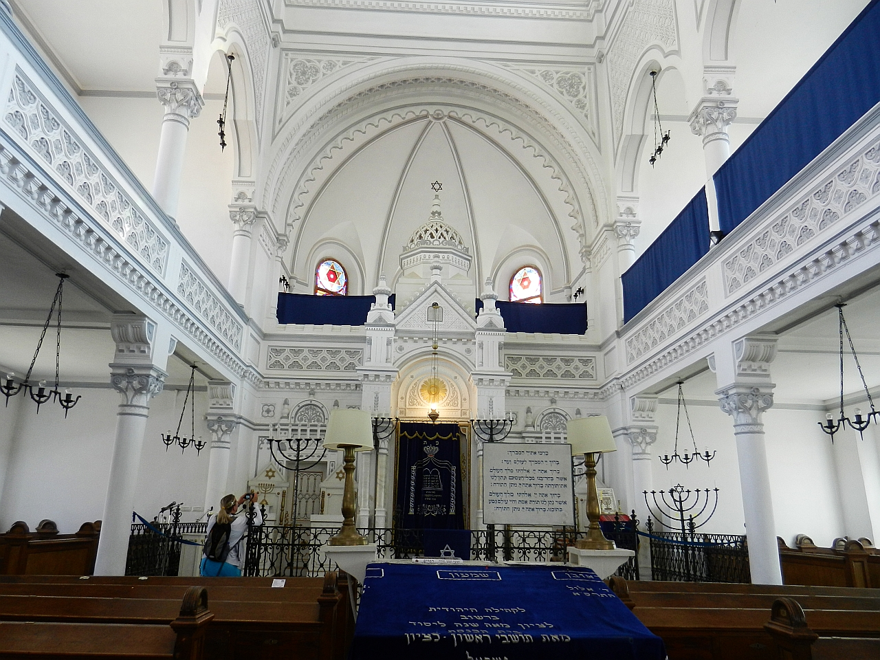 Sinagoga Neologă din Brașov, 1901